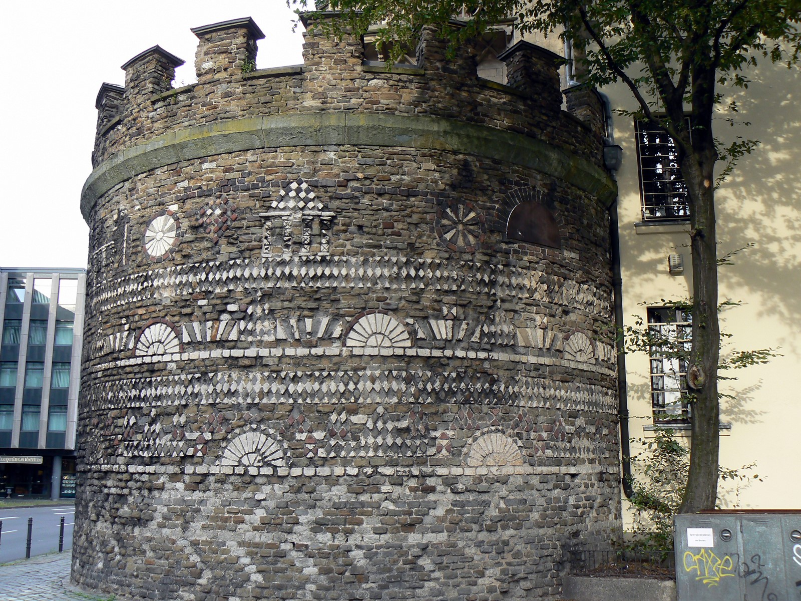 Der Römerturm in Köln. Nordwestlicher Eckturm der römischen Stadtbefestigung, erbaut: um 50 n. Chr.